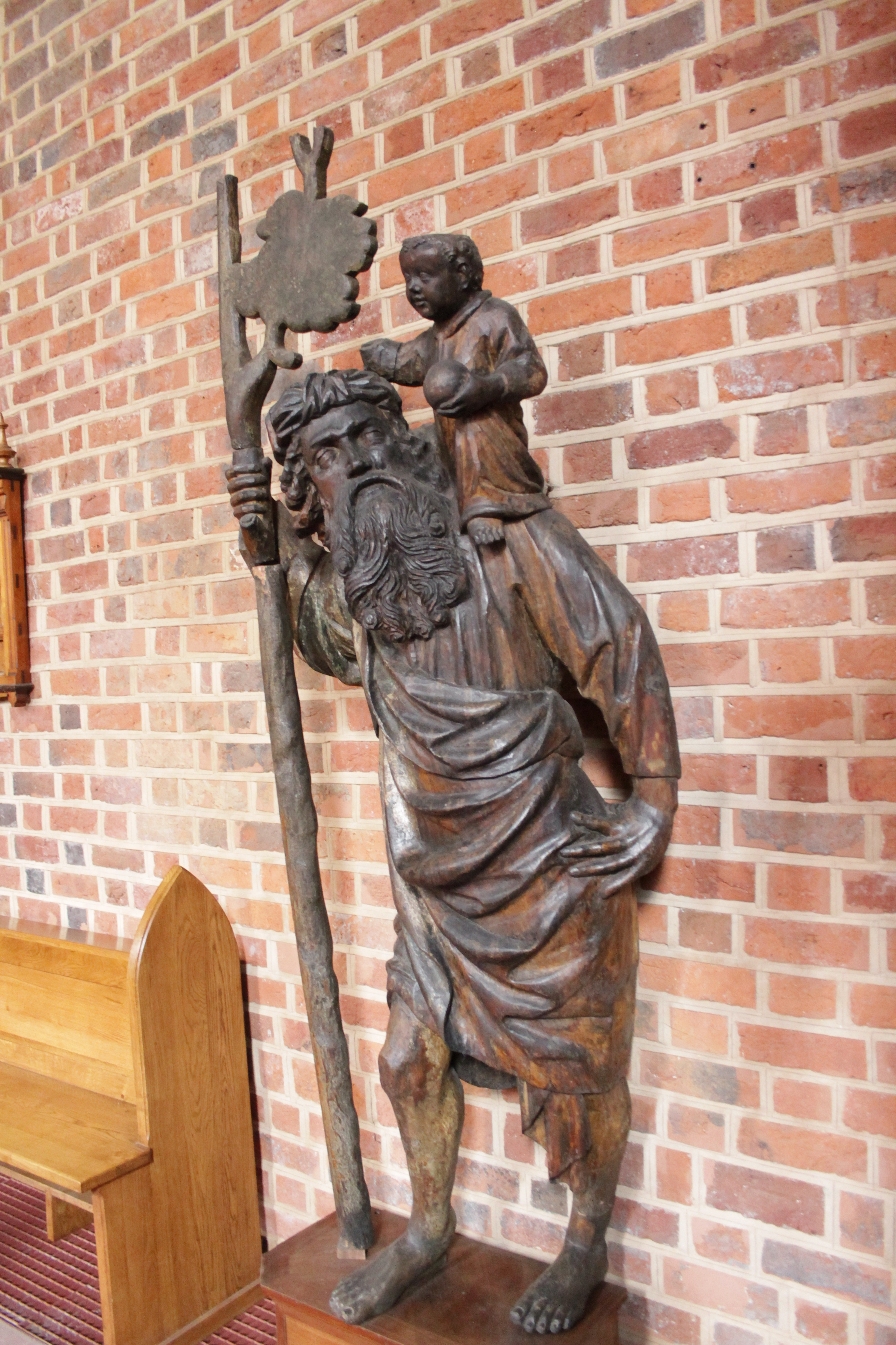 Figura Św. Krzysztofa (1462) w kościele Św. Krzysztofa we Wrocławiu.